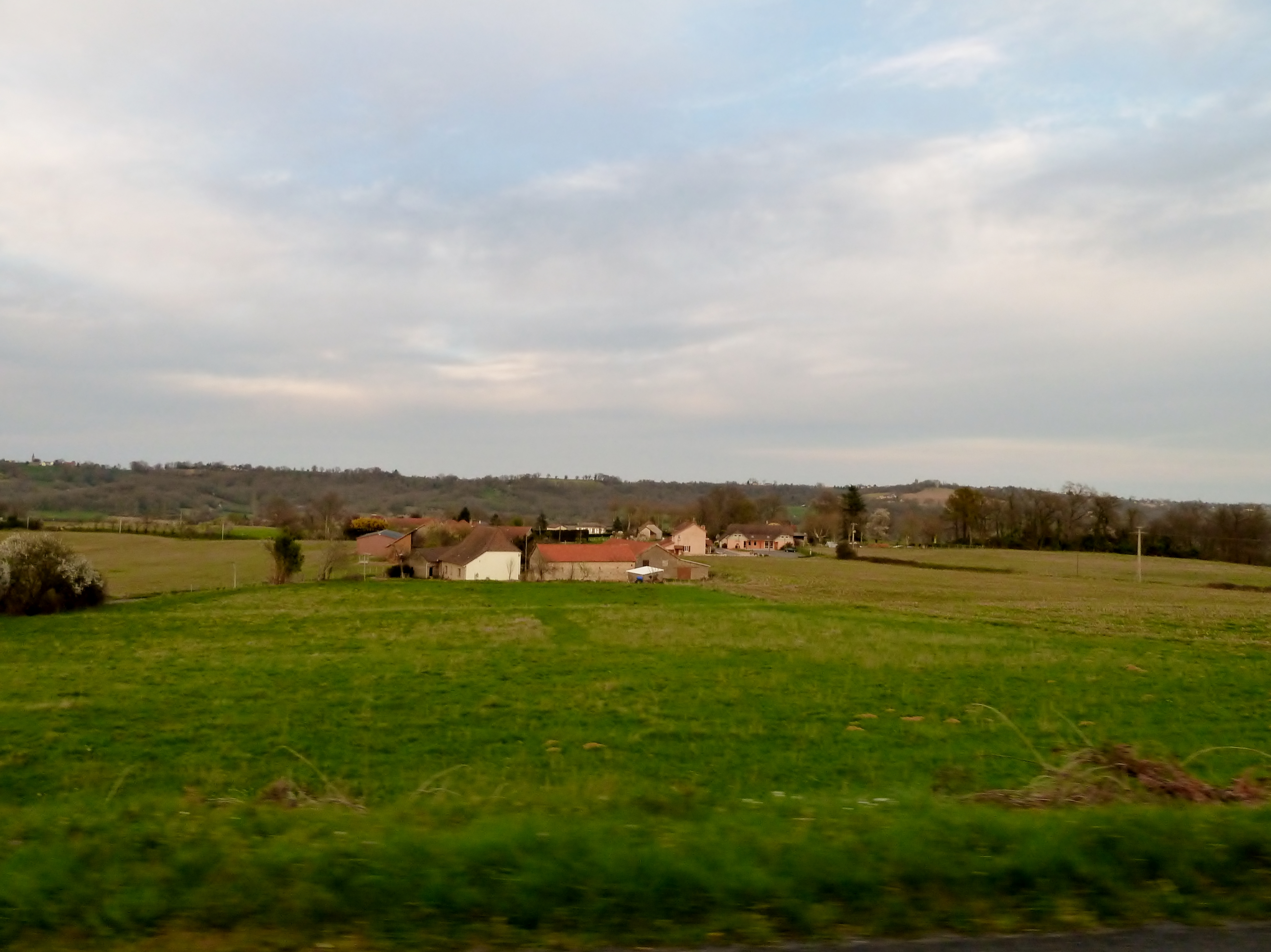 Auga